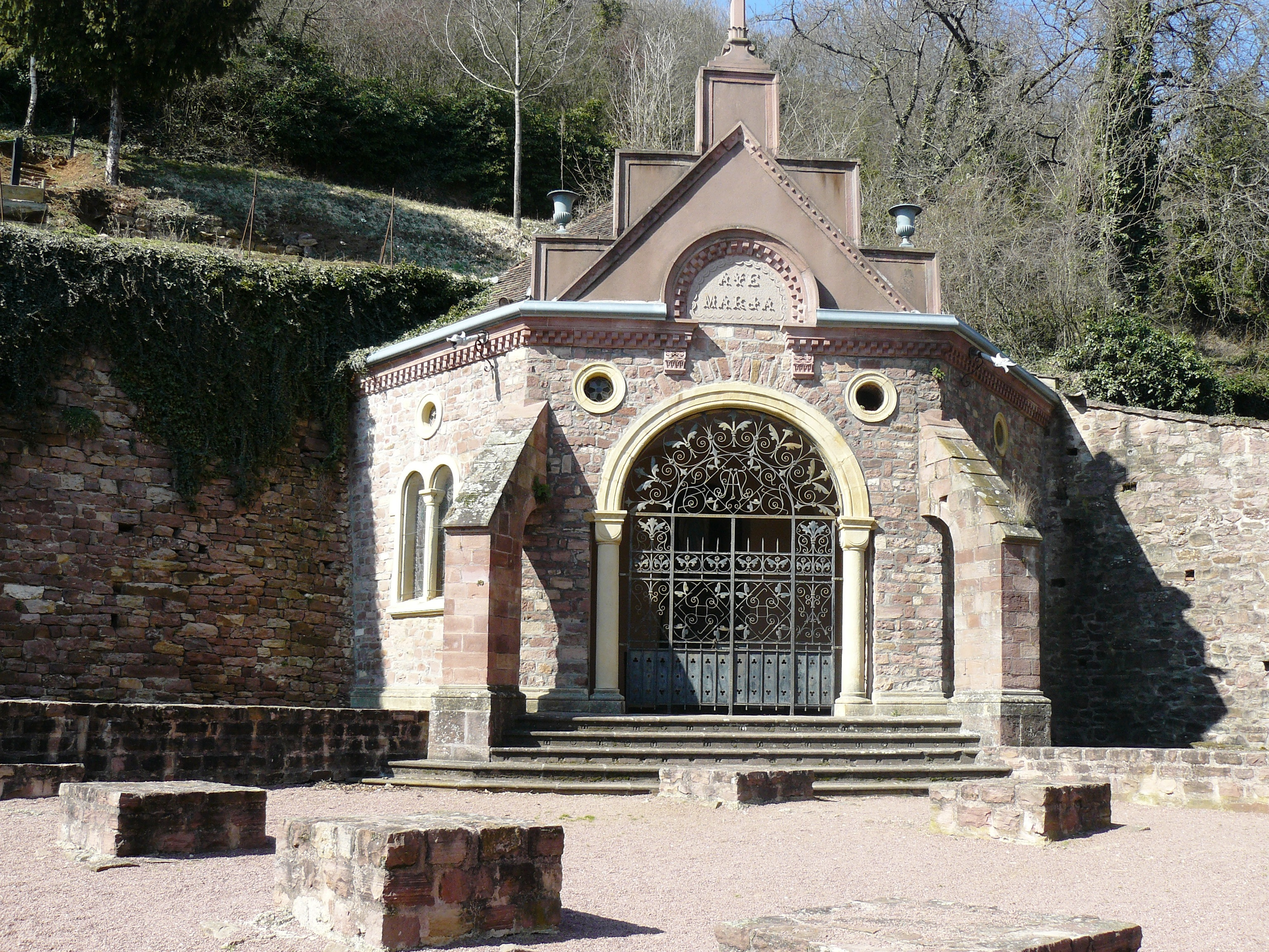 Grotte de Notre Dame de Lourdes, dans l'enclos de l'église Saint-Pantaléon